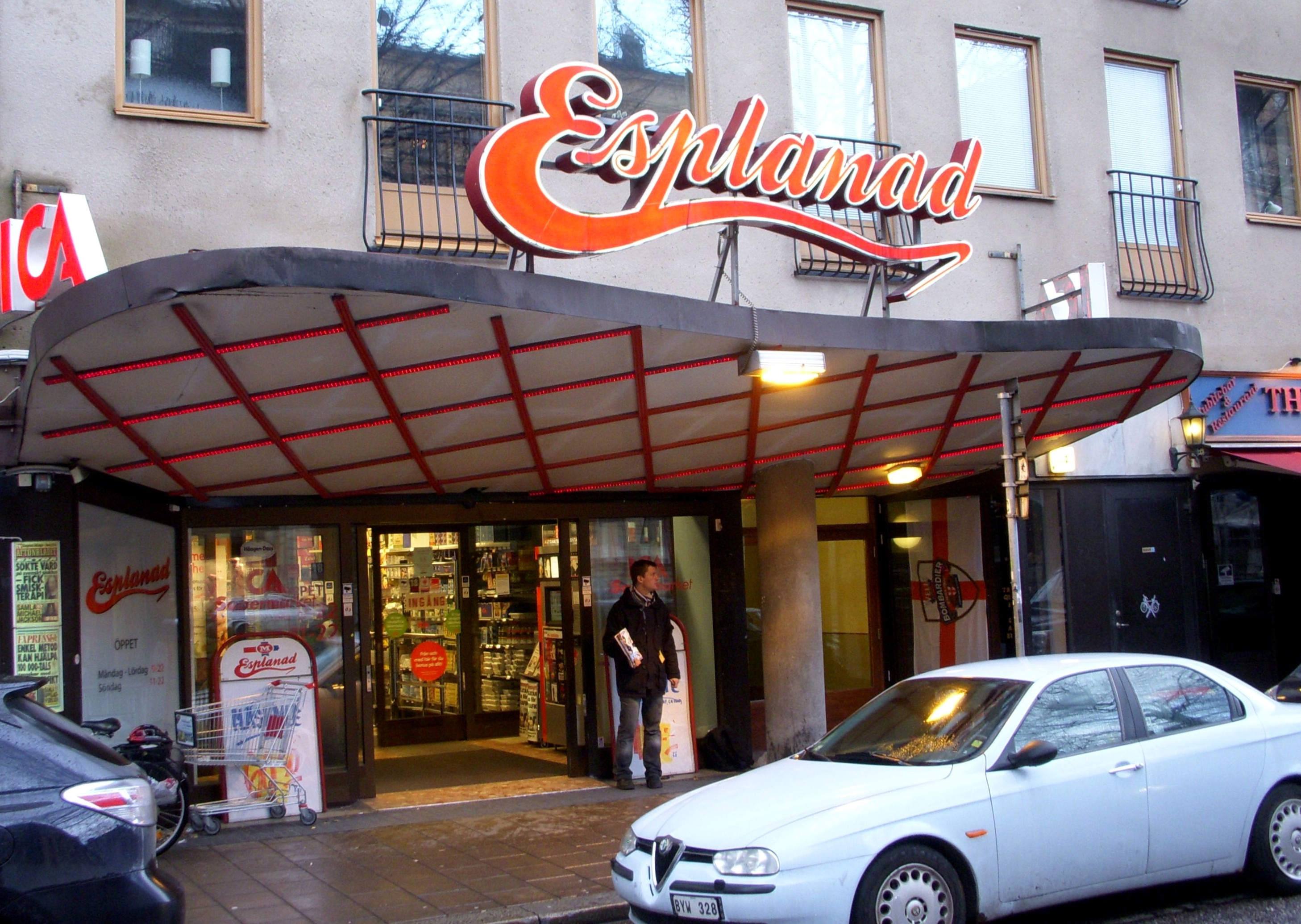 Före detta biografen "Esplanad" i Stockholm